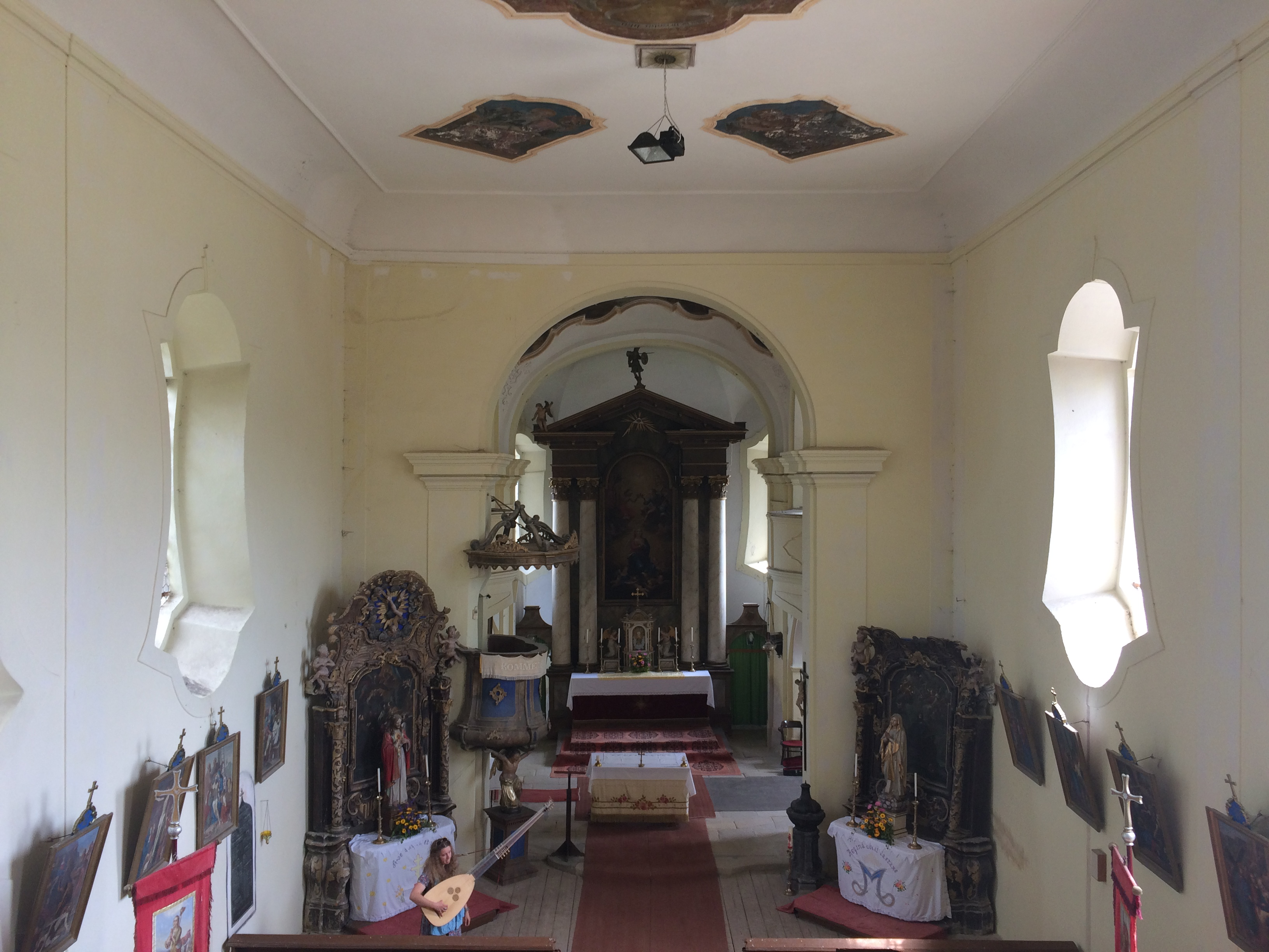 Interiér kostela pohledem z kruchty